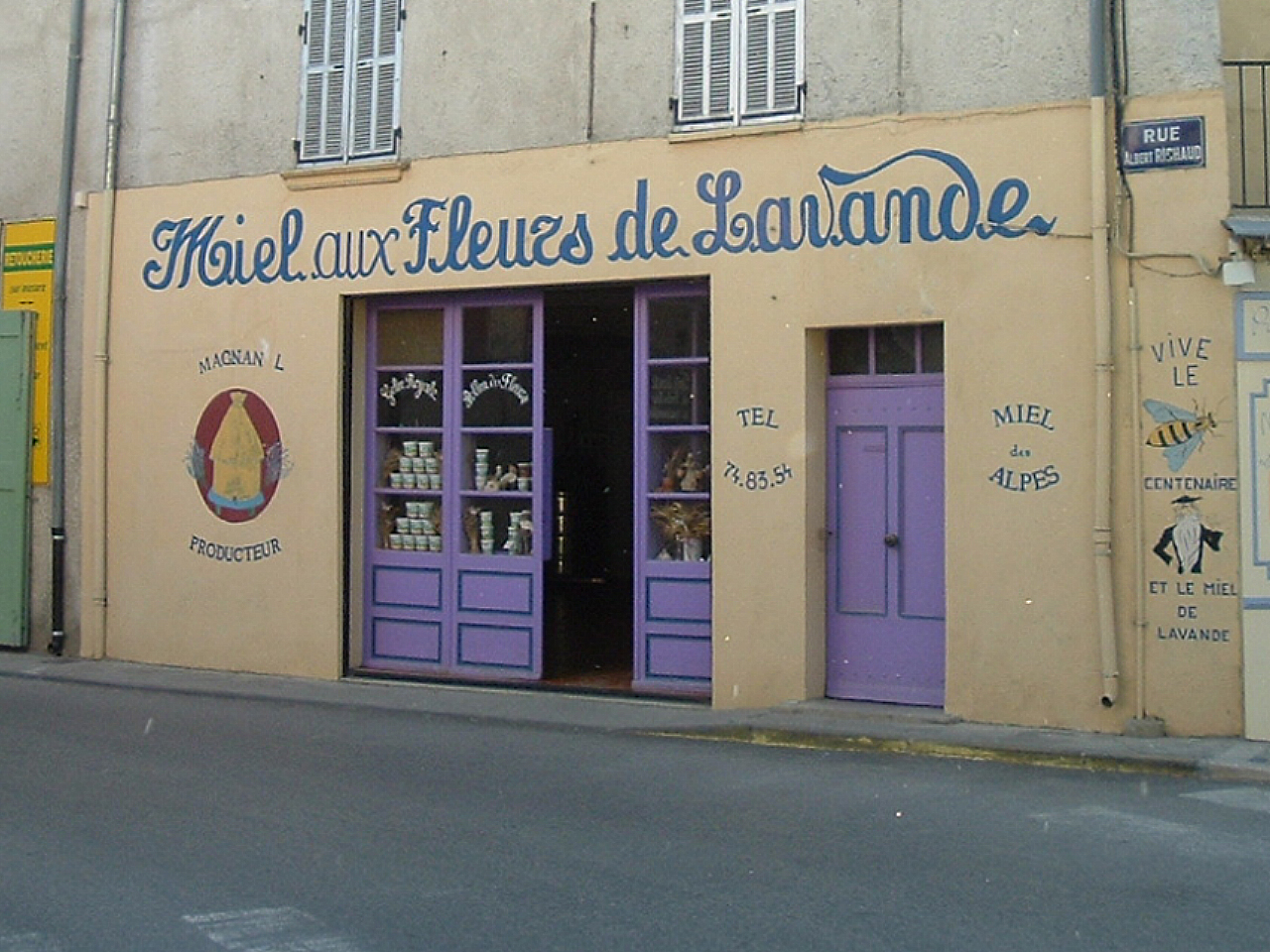 Miel de fleurs de lavande à Valensole